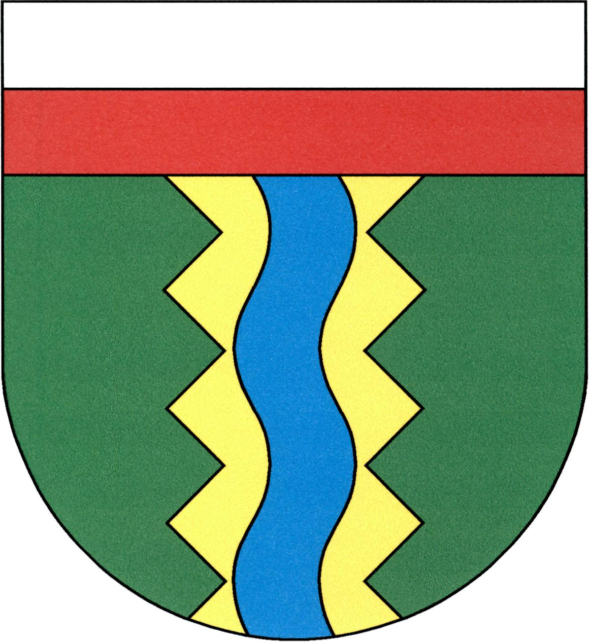 Znak obce Srbská Kamenice